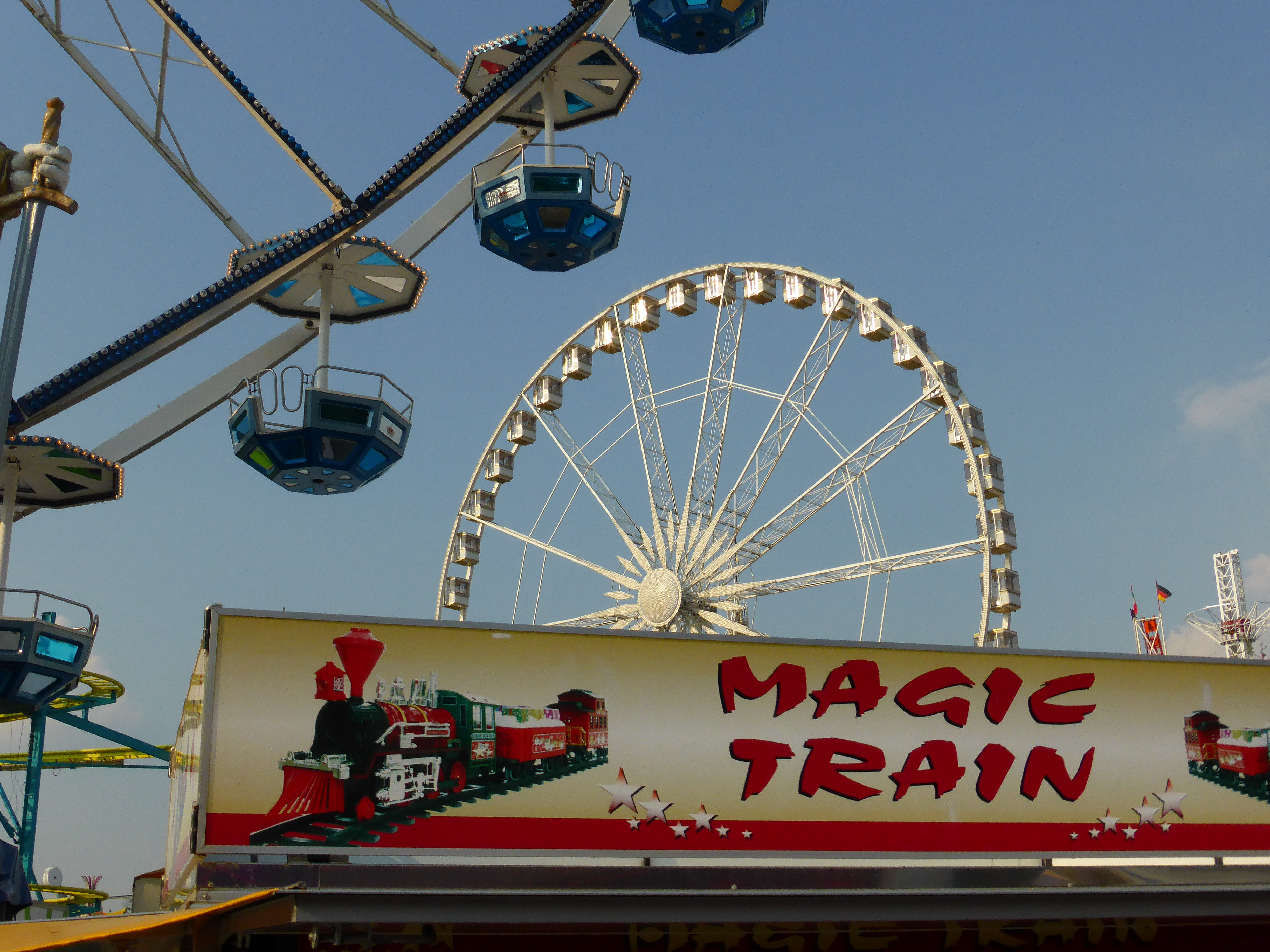 Foire du Trône 2013, Paris.